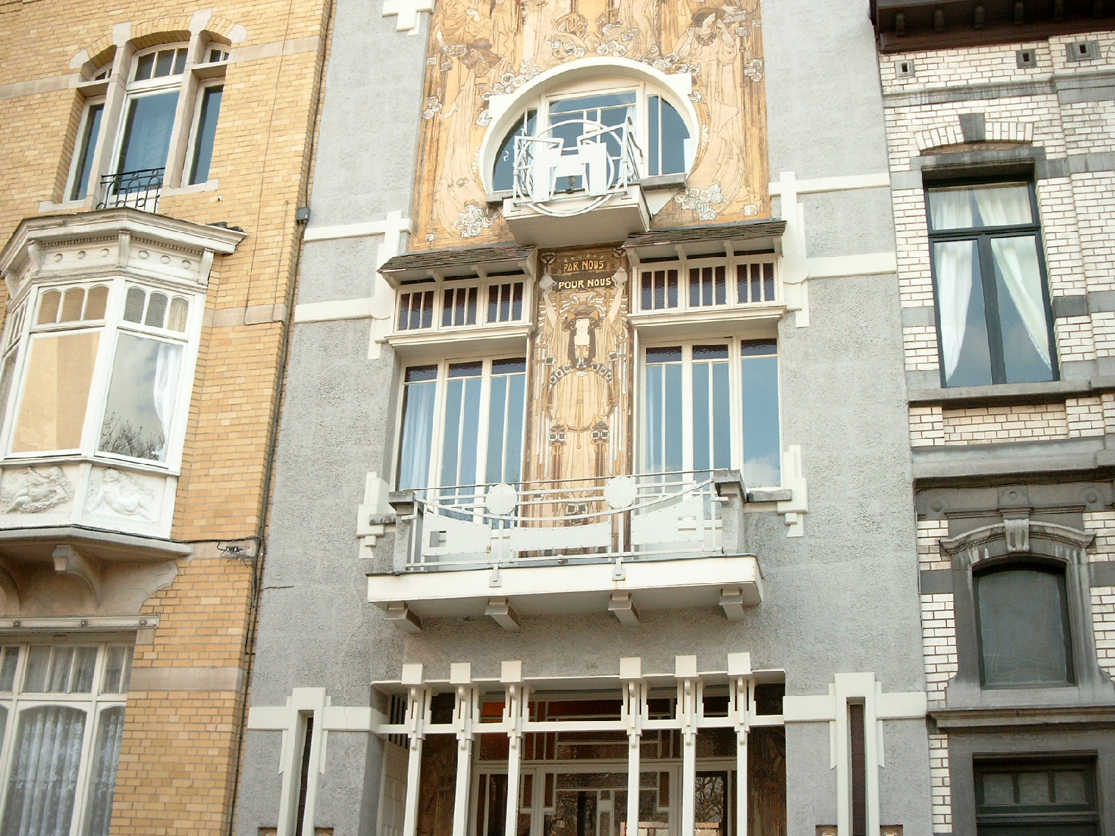 Voorgevel Cauchie-huis, Brussel (1905)